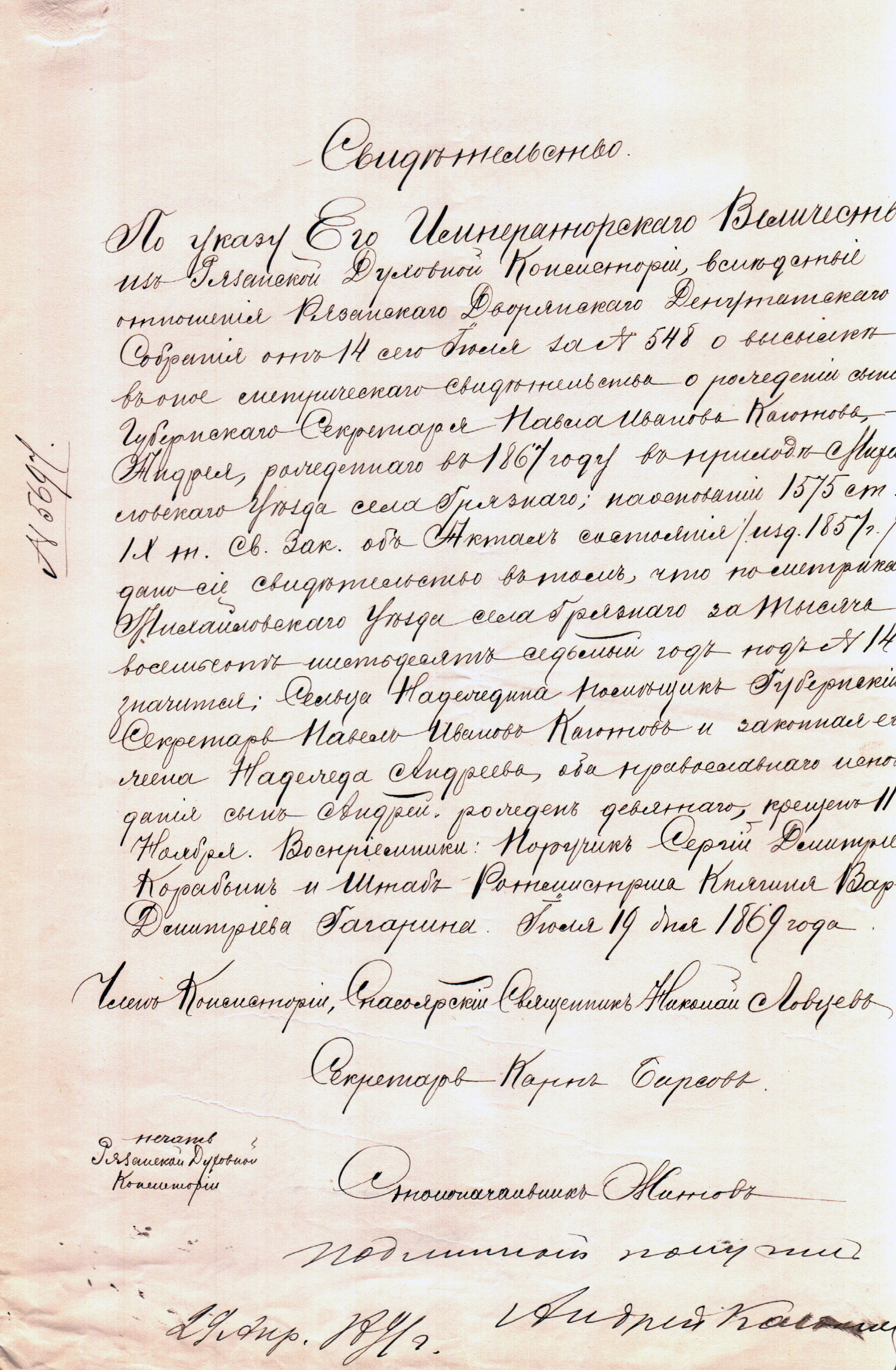 Метрическое свидетельство о рождении А.П.Каютова